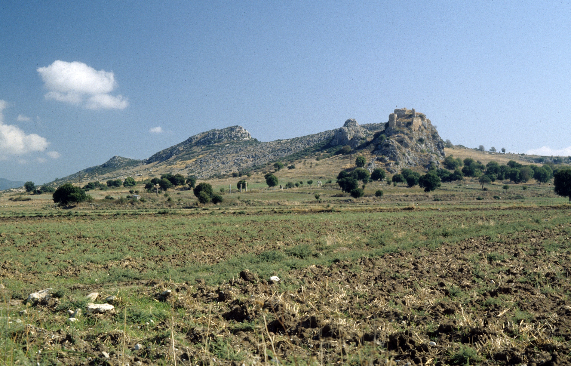 Burgberg von Hierapolis Castabala, Südtürkei nahe Ceyhan, im Vordergrund Reste der Säulenstraße